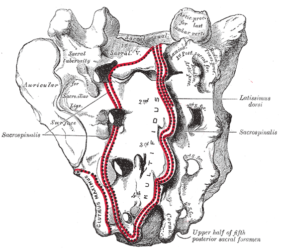 Sacrum, dorsal surface.